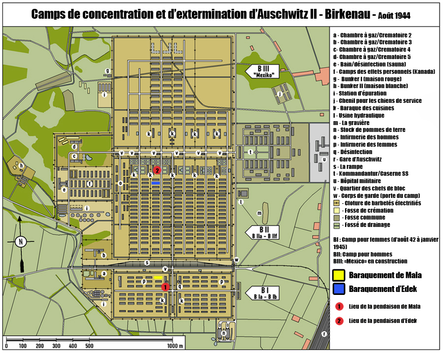 Adaptation pour article Mala Zimetbaum sur WP